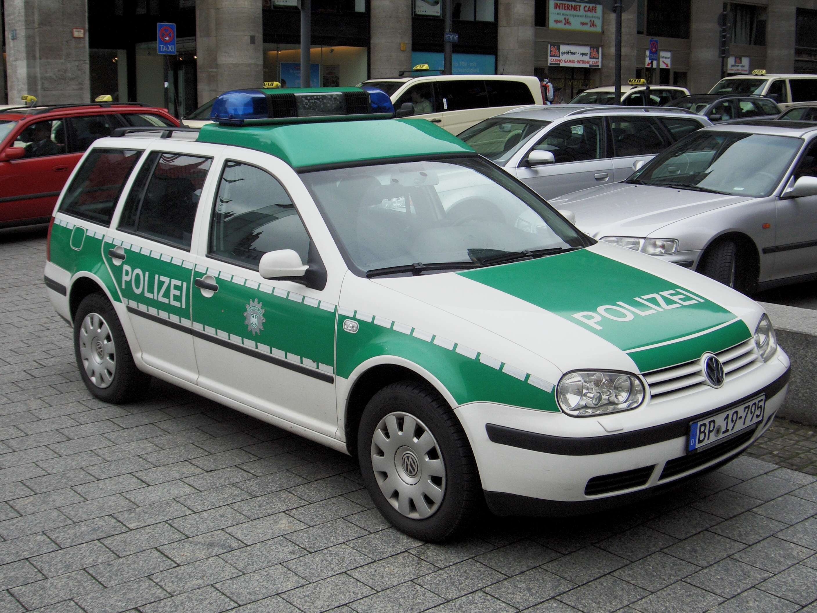 VW Golf Variant TDI, GenIV (2001-2006), Bundespolizei Germany. Numberplate: BP = Bundespolizei, 19 = patrol car, 795 = individual car id number